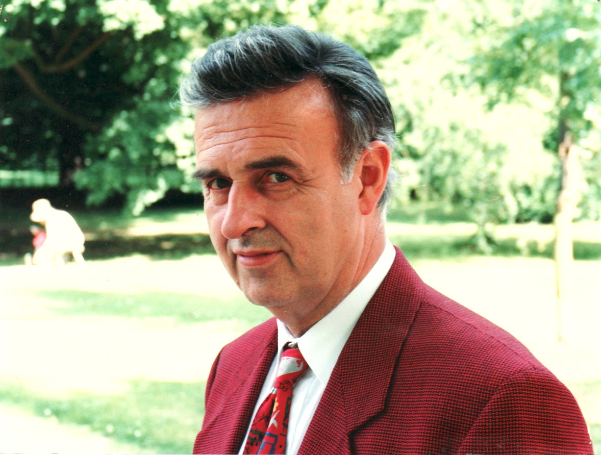 Klaus-Gerd Hermann Neuhöfer (* 27. November 1940 in Bad Nauheim) ist Vorsitzender des Fördervereins der Kurstadt Bad Nauheim e.V. und bekannt als "Retter der Gradierbauten". Er wurde mit dem Ehrenpreis der Bürgerstiftung "Ein Herz für Bad Nauheim" ausgezeichnet. Am 08.09.2005 verlieh der Landrat des Wetteraukreises Rolf Gnadl ihm die Ehrenurkunde für die beispielhafte denkmalpflegerische Initiative zum Erhalt und Sanierung der Bad Nauheimer Gradierbauten. Am 14.05.2007 verlieh Bundespräsident Horst Köhler ihm das Bundesverdienstkreuz am Bande.